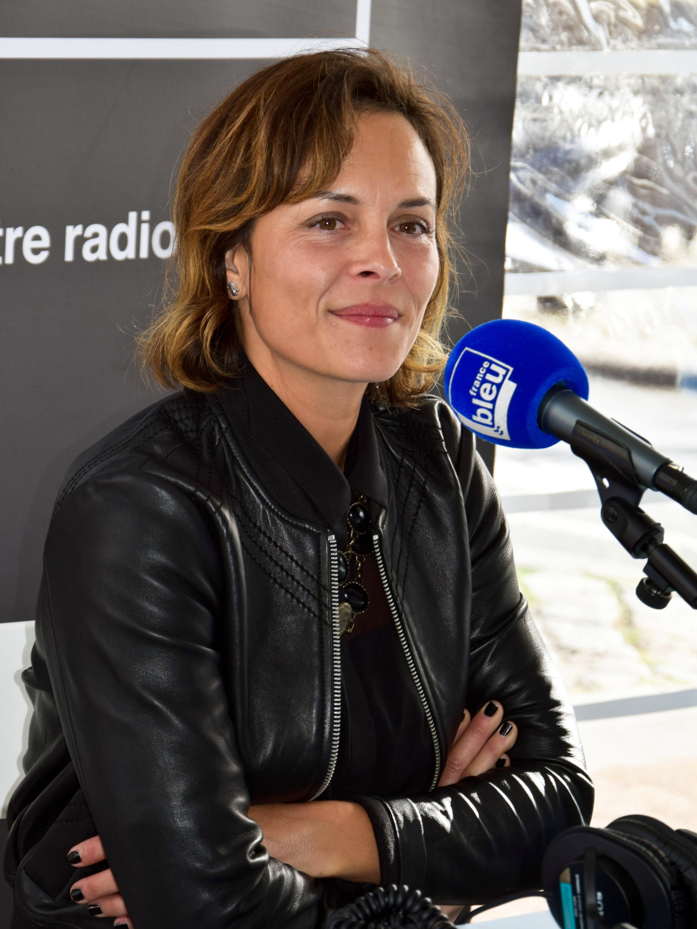 Armelle Deutsch au micro de France Bleu La Rochelle à l'occasion du 18e Festival de la Fiction TV de La Rochelle, septembre 2016